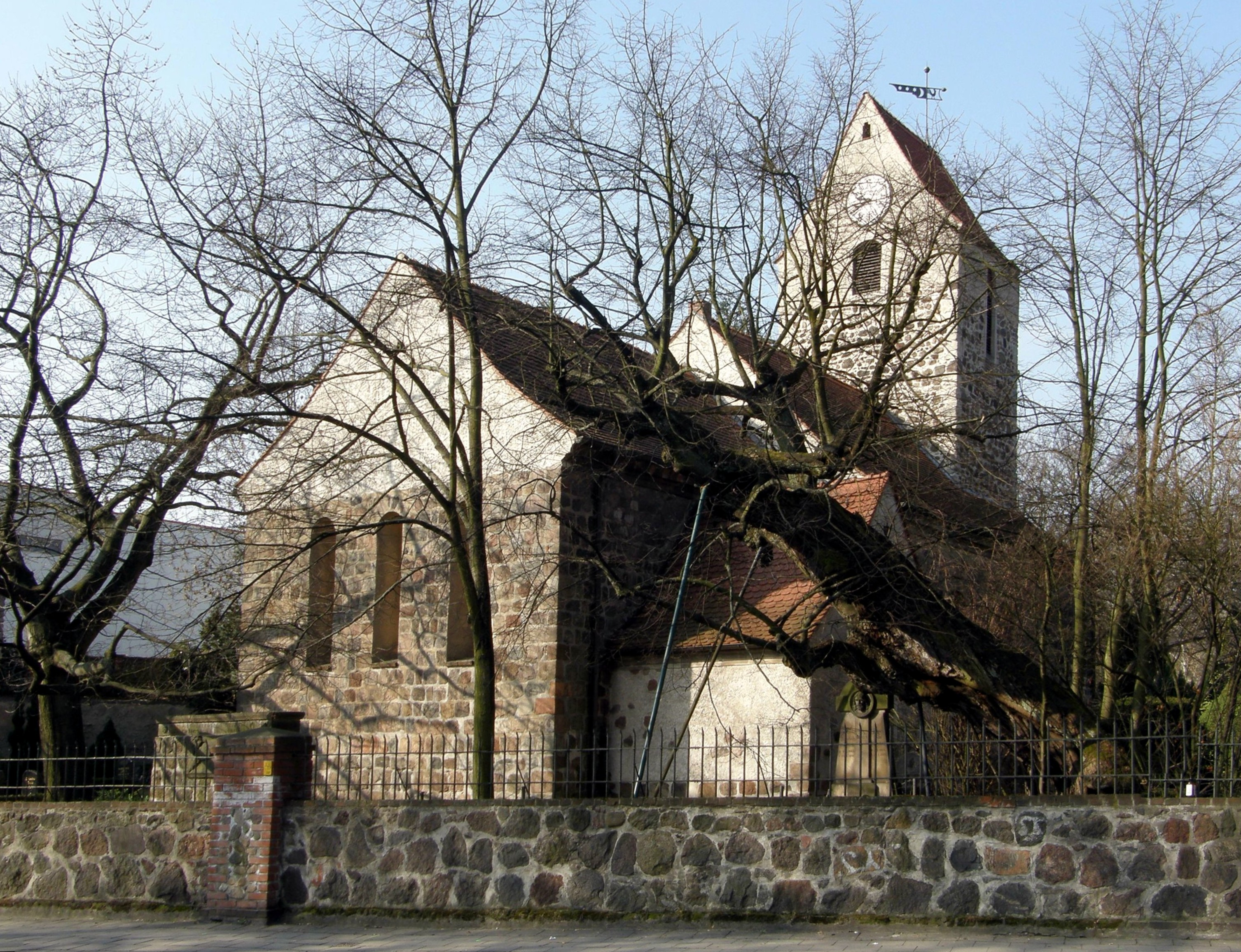 Berlin-Mahlsdorf, Hönower Str., alte Pfarrkirche; Gesamtansicht